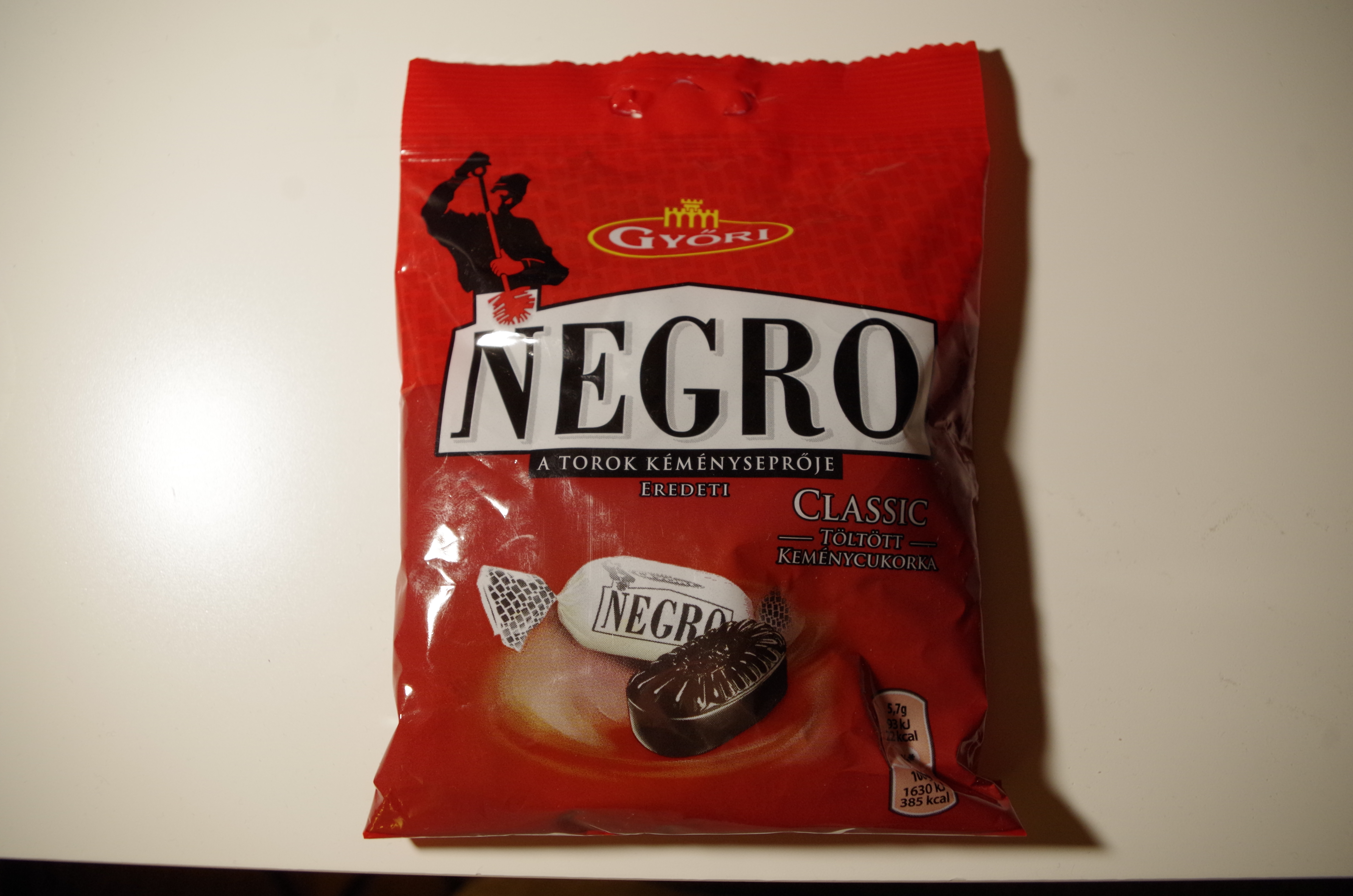 Ungari Győris toodetud Negro kompvekipakk